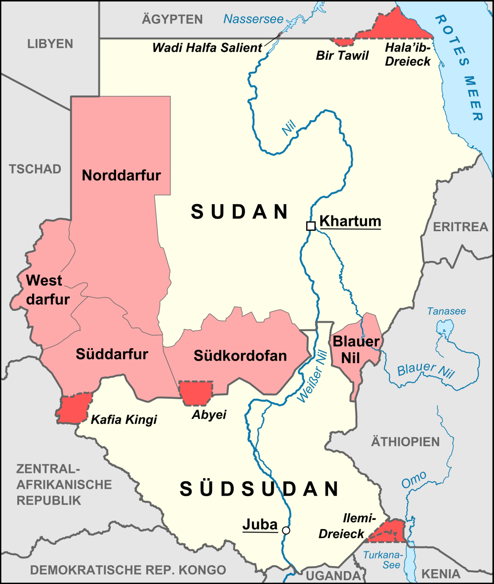 Konfliktregionen (Nord- und Süddarfur, Südkordofan und Blauer Nil) und umstrittene Gebiete Abyei, Kafia Kingi, Ilemi-Dreiländereck Südsudan-Kenia-Äthiopien, Hala’ib-Dreieck, Wadi Halfa Salient und Bir Tawil) im Sudan und Südsudan: Umstrittene Gebiete Konfliktregionen